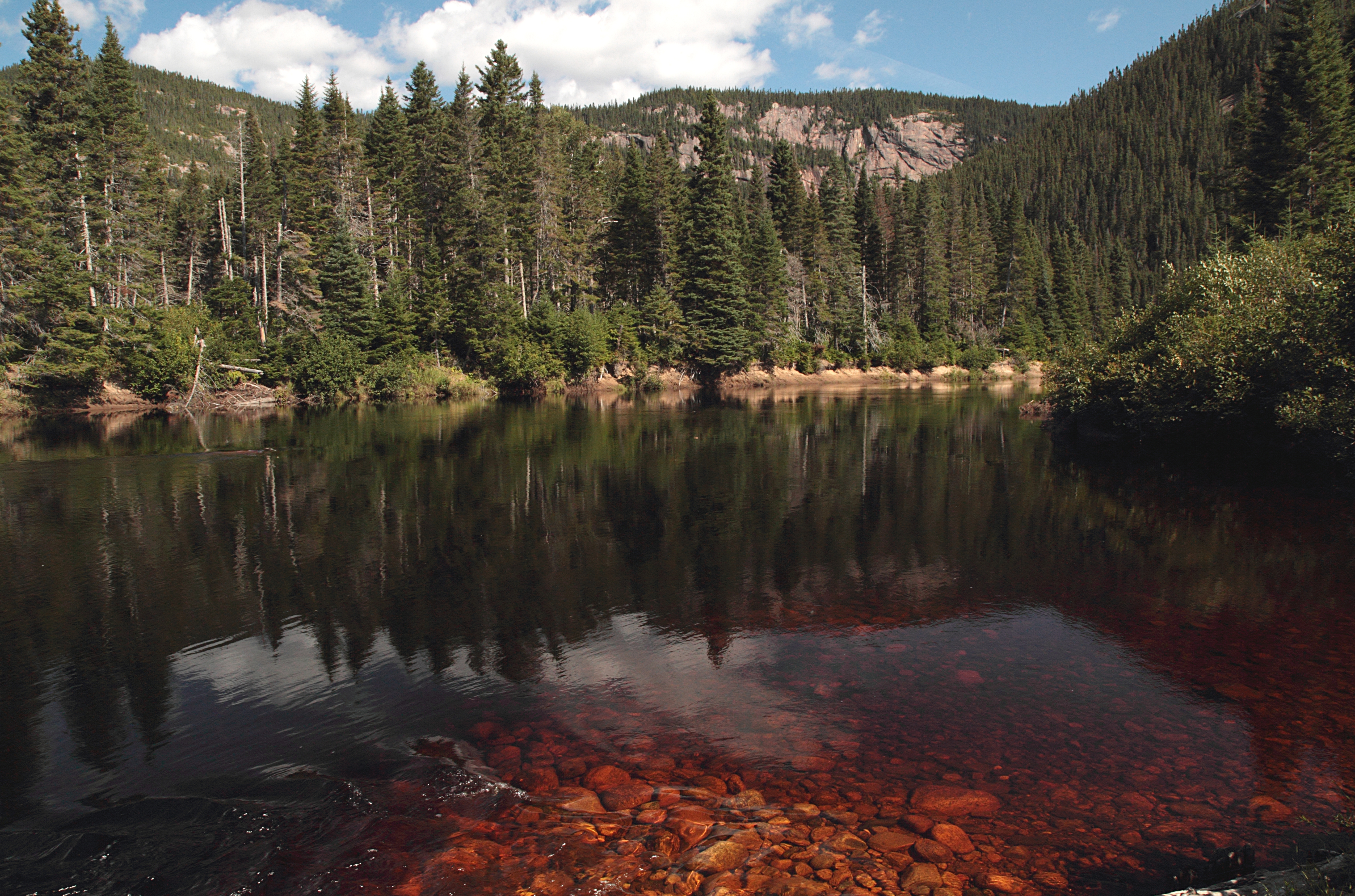 Rivière MacDonald, Réserve Faunique Port-Cartier-Sept-Îles, Québec, Canada